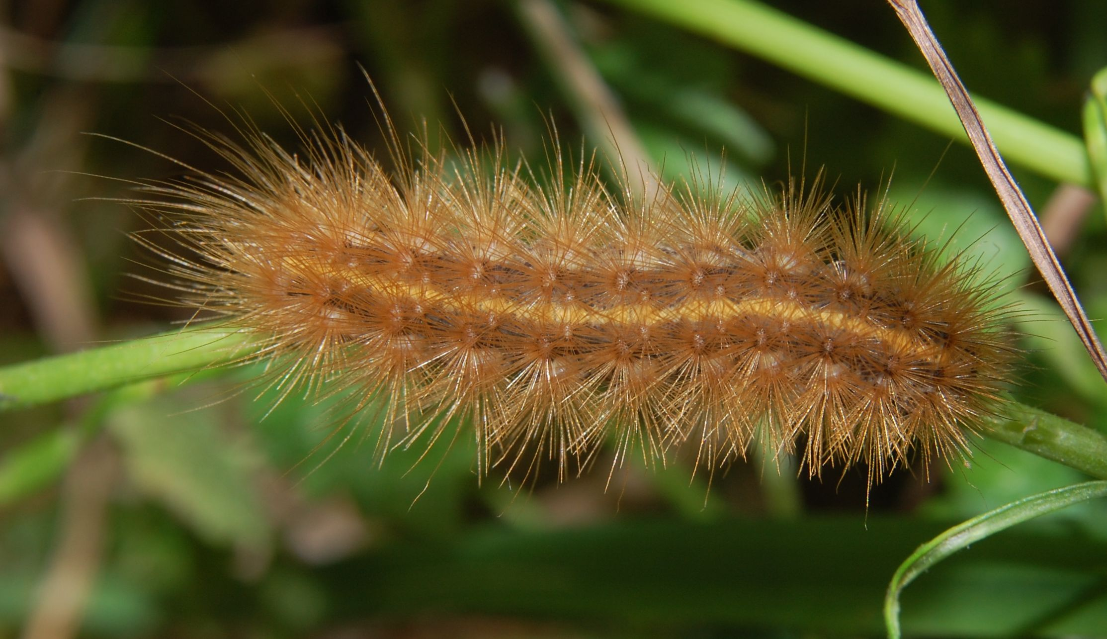 Phragmatobia fuliginosa, Raupe. Feuchtwiese auf Tiefwerder, Berlin, Bezirk Spandau